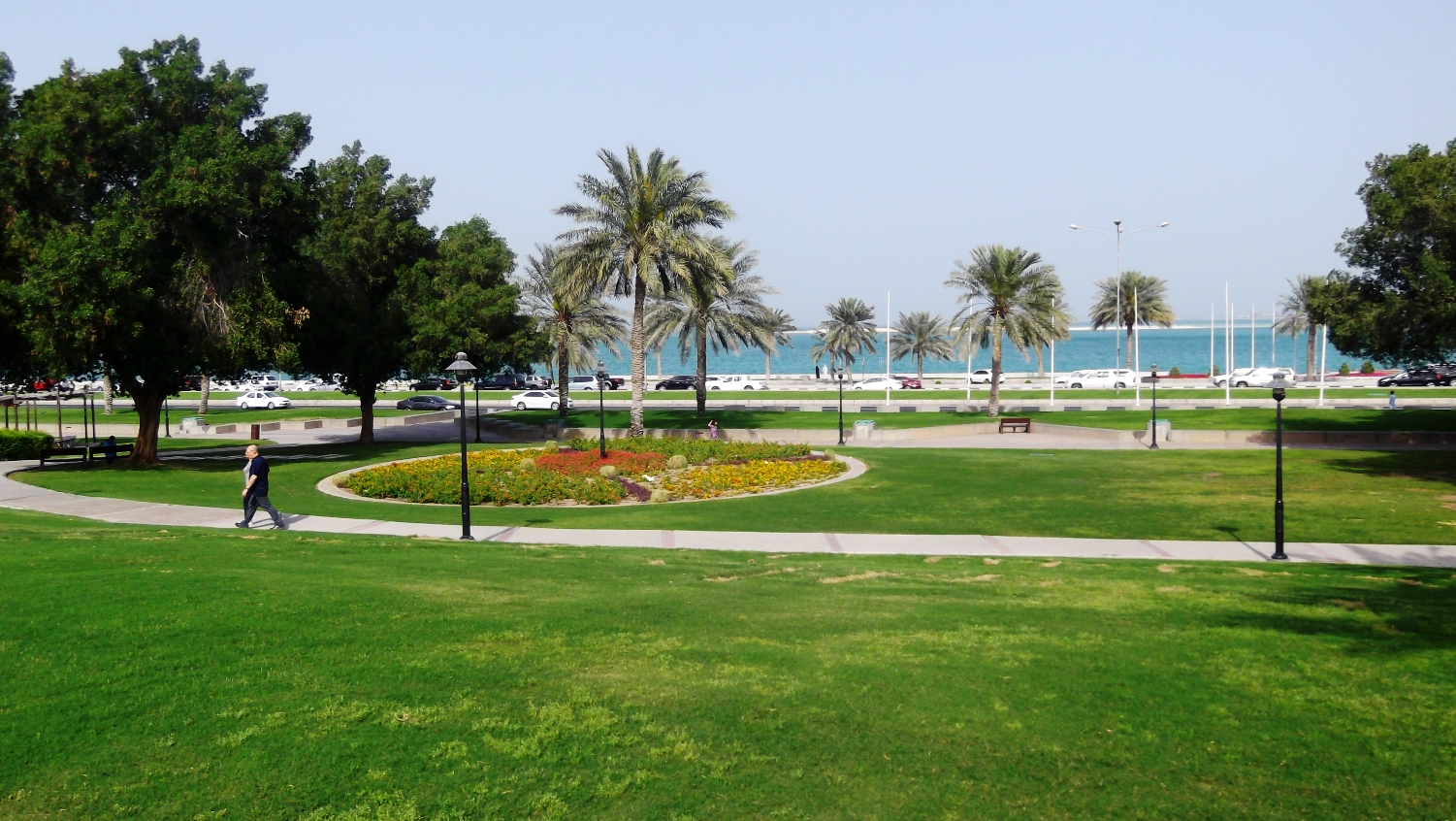 Al Bida Park, Westbay Doha, Qatar